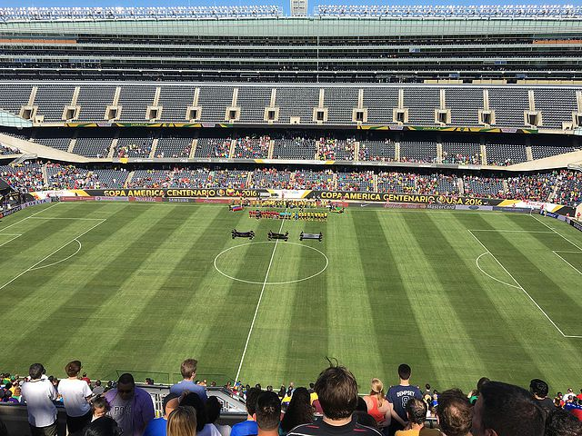 Venezuela-Jamaica Copa América Centenario 2016. Soldier Field, Chicago.